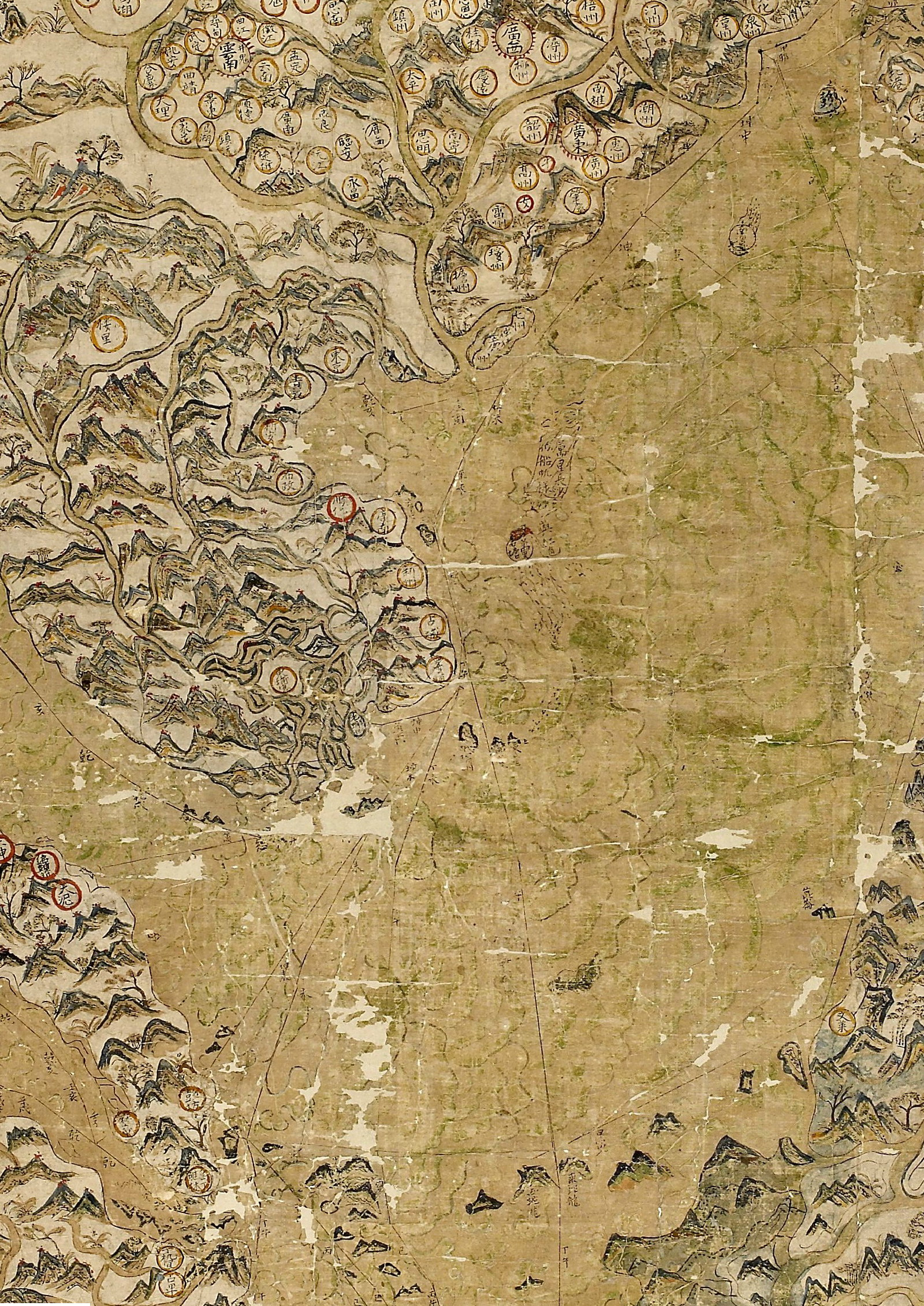 Bản đồ "The Selden Map of China" được lưu trữ tại thư viện Đại học Oxford (Anh), được cho là "Thiên hạ hải đạo toàn đồ" hay "Đông - Tây dương hàng hải đồ" và được làm ra vào khoảng năm Thiên Khải thứ 4 (1624), có ghi địa danh Vạn Lí Thạch Đường (萬里石塘), (phía đông của đảo mang tên Ngoại La (外羅), tức đảo Lý Sơn), ở kề cận phía nam tây nam của Vạn Lí Trường Sa (萬里長沙).